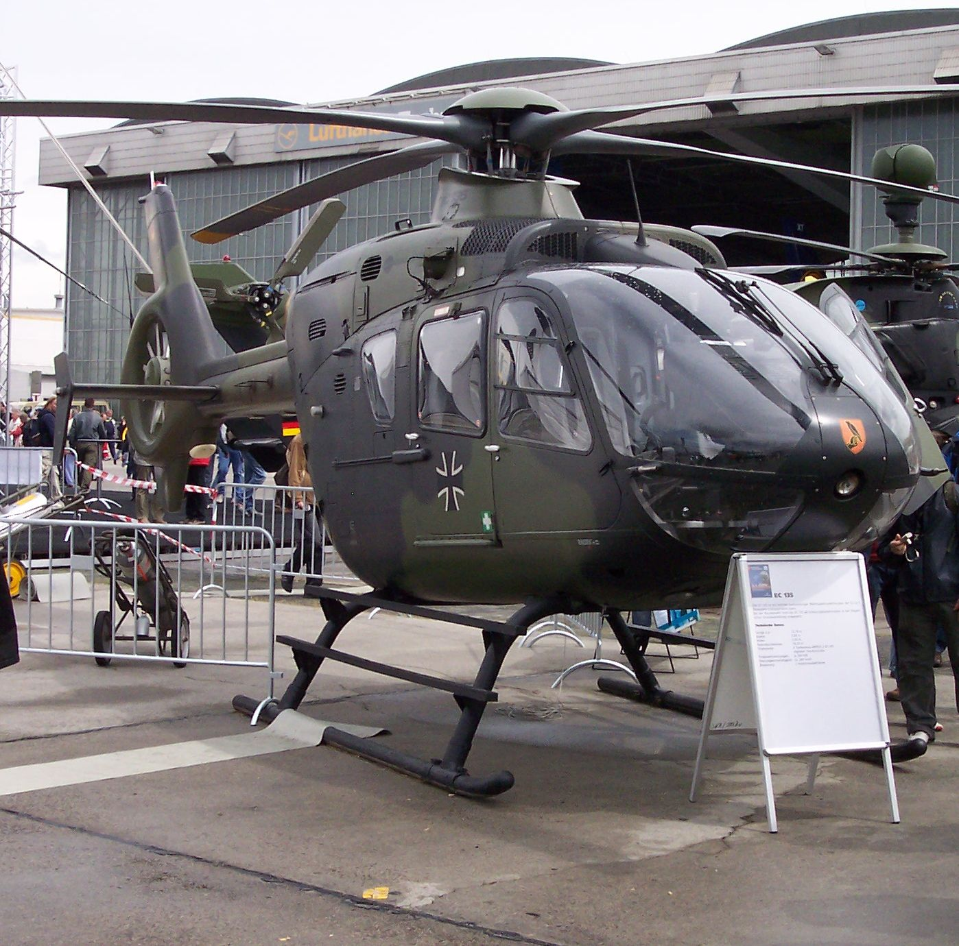 Eurocopter EC 135 Bundeswehr, ILA 2006